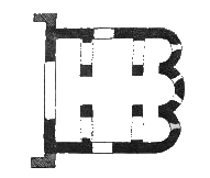 План Южного Зеленчукского храма.